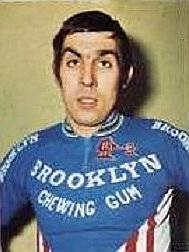 Patrick Sercu en 1973 - Campioni dello Sport 1973-1974, n°155